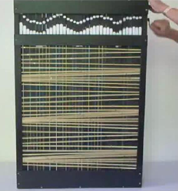 Die Eitz'sche Wellenmaschine des Martin-Luther-Gymnasiums in Eisleben. Das Gerät wurde 2010 restauriert und ist voll funktionstüchtig.